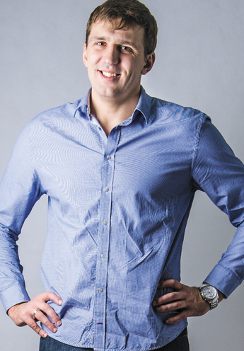 Виталий Юрчик. Заслуженный мастер спорта. Бронзовый призер Игр (Афины, 2004), многократный чемпион и обладатель Кубка России по водному поло. Фотография из серии «Лица эстафеты».